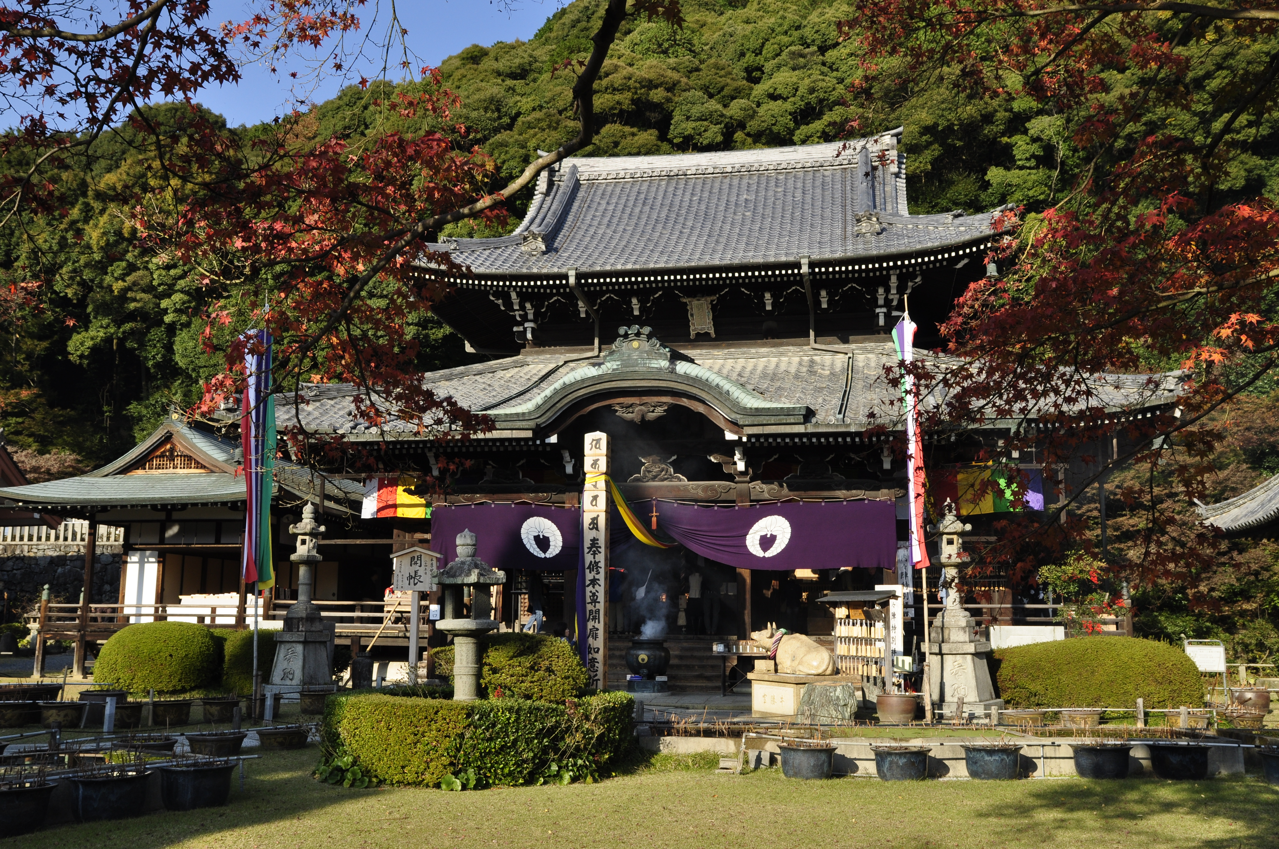 明星山三室戸寺本堂